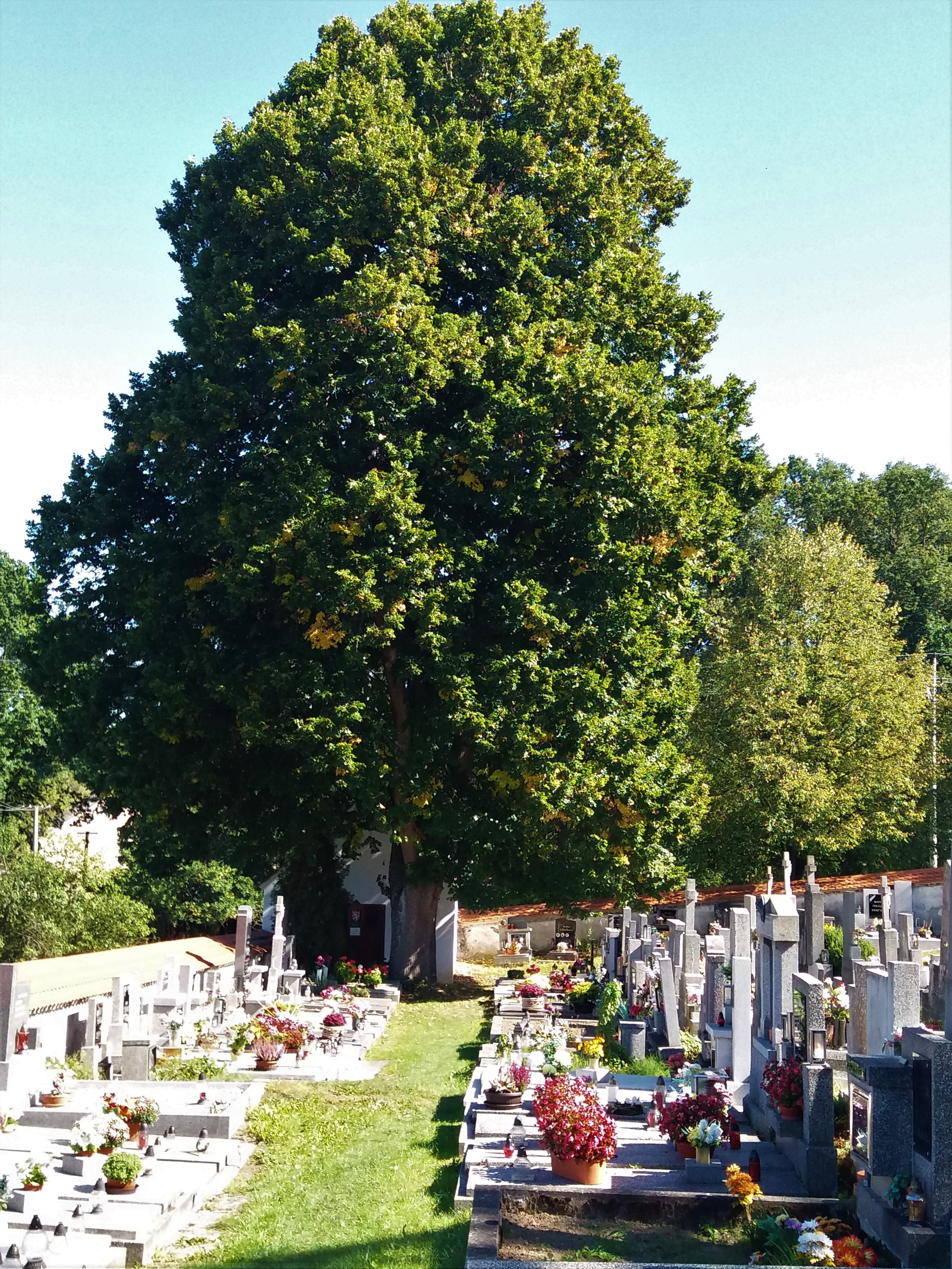 Na místním hřbitově